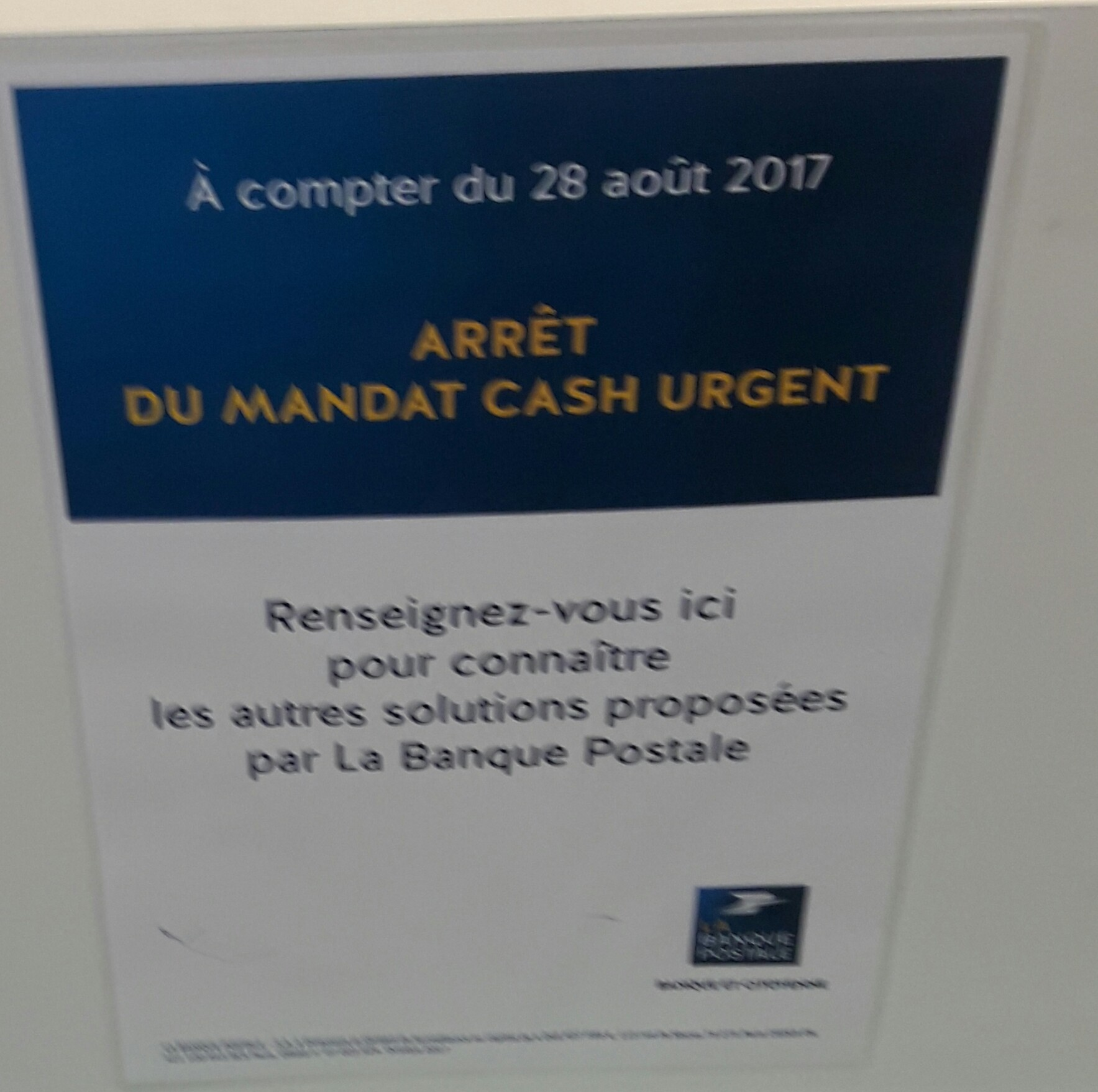 Publié dans tous les bureaus de La Poste